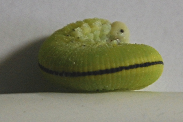 Raupe der Großen Birkenblattwespe (Cimbex femoratus)